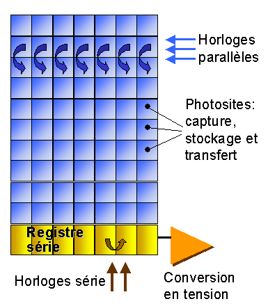 Schematic layout of a full-frame CCD sensor / Schéma d'un capteur CCD pleine trame Illustration personnelle / Personal drawing